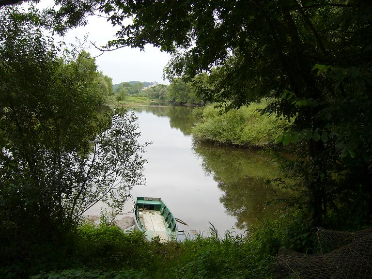 La divatte se jetant dans la Loire et le village de La Varenne au fond.